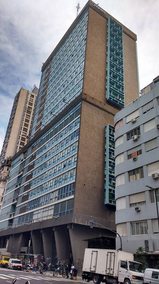 Vista peatonal del Edificio República.